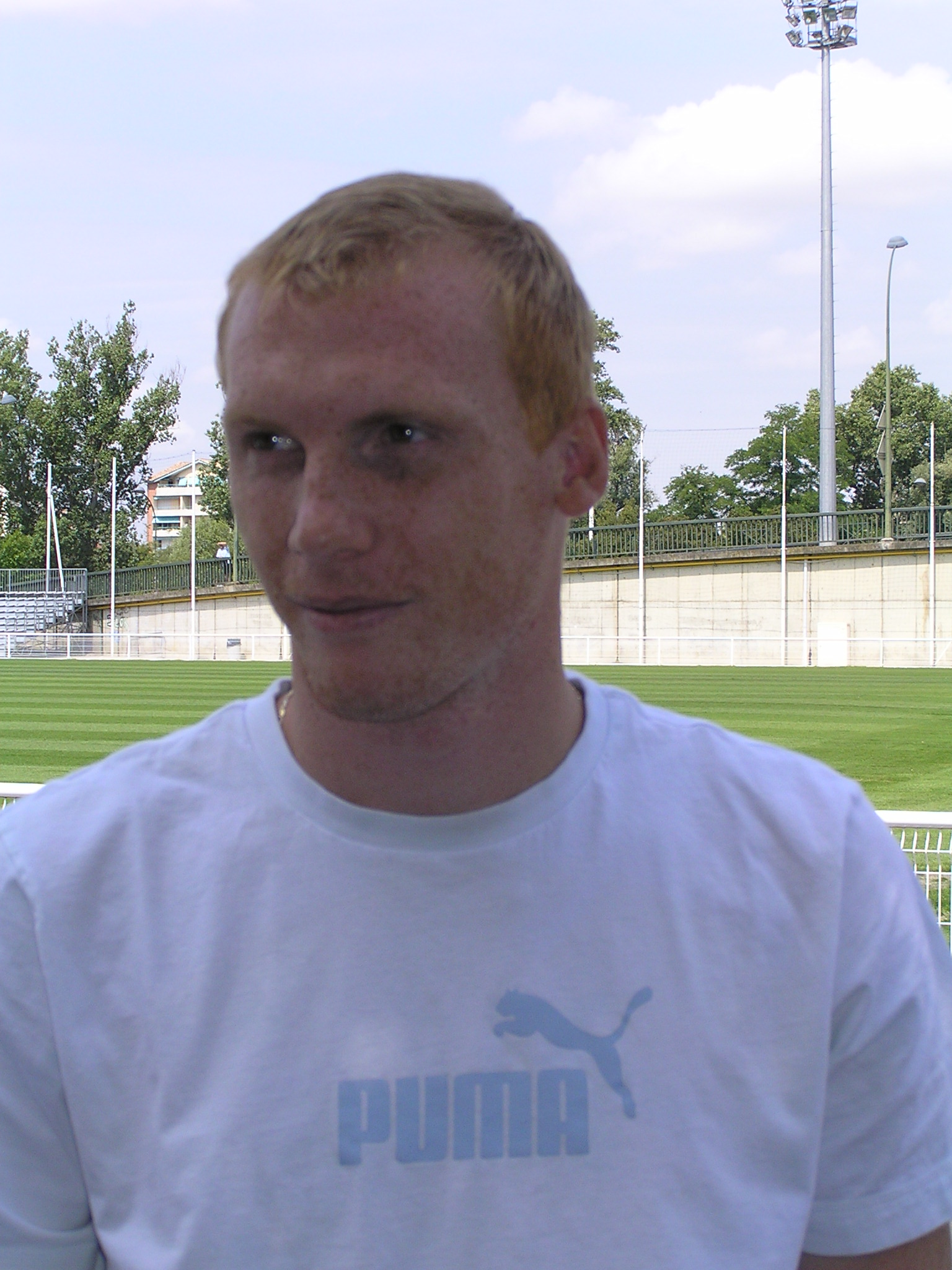 Jérémy Mathieu joueur au Toulouse Football Club